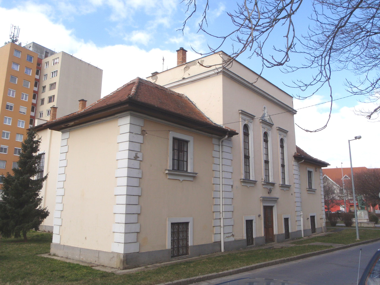 Szombathely Szent Domonkos-rendi templom Rendház és Kultúrház. - Szombathely